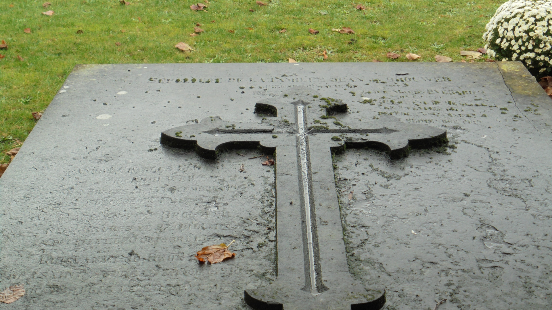 Grafsteen van de familie Jean de Brouwer op het kerkhof van Sint-Andries (Brugge) (vak 1, tegen de zijgevel van het huis Gistelsesteenweg 491). Foto genomen op 4 november 2019.